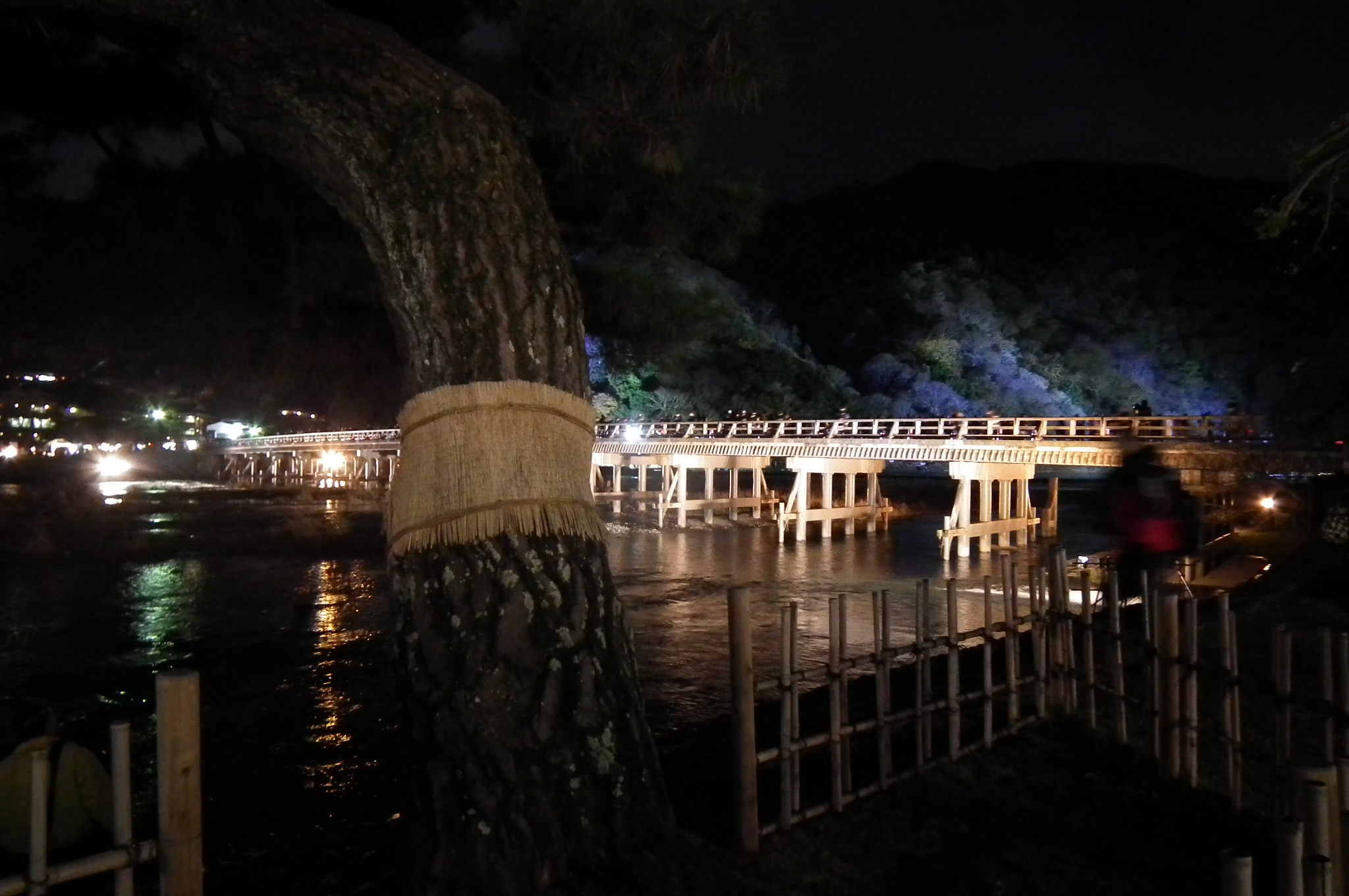 Arashiyama Hanatōro 嵐山花灯路 渡月橋付近